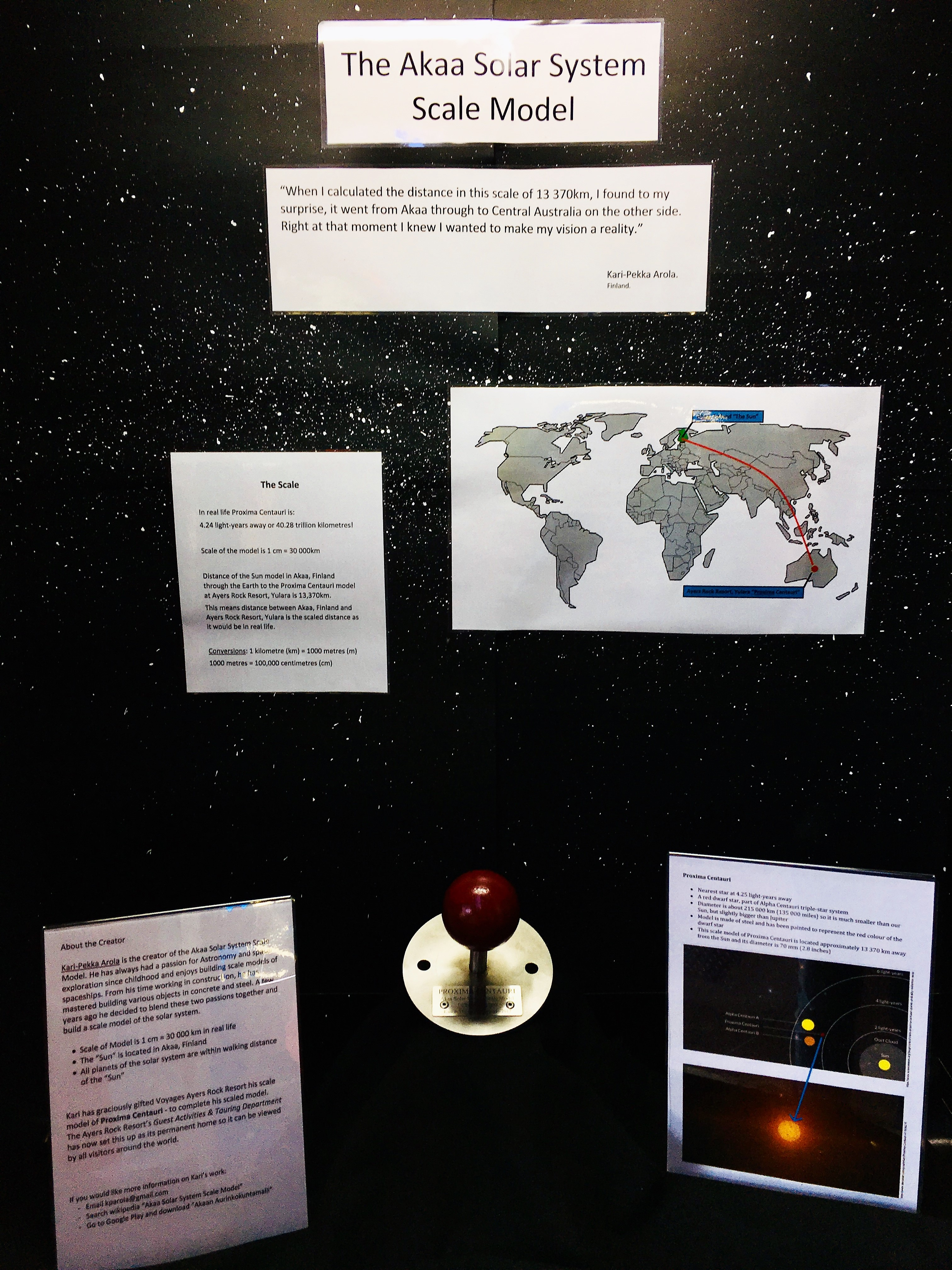 Proxima Centauri -tähden pienoismalli Yularassa, Australiassa